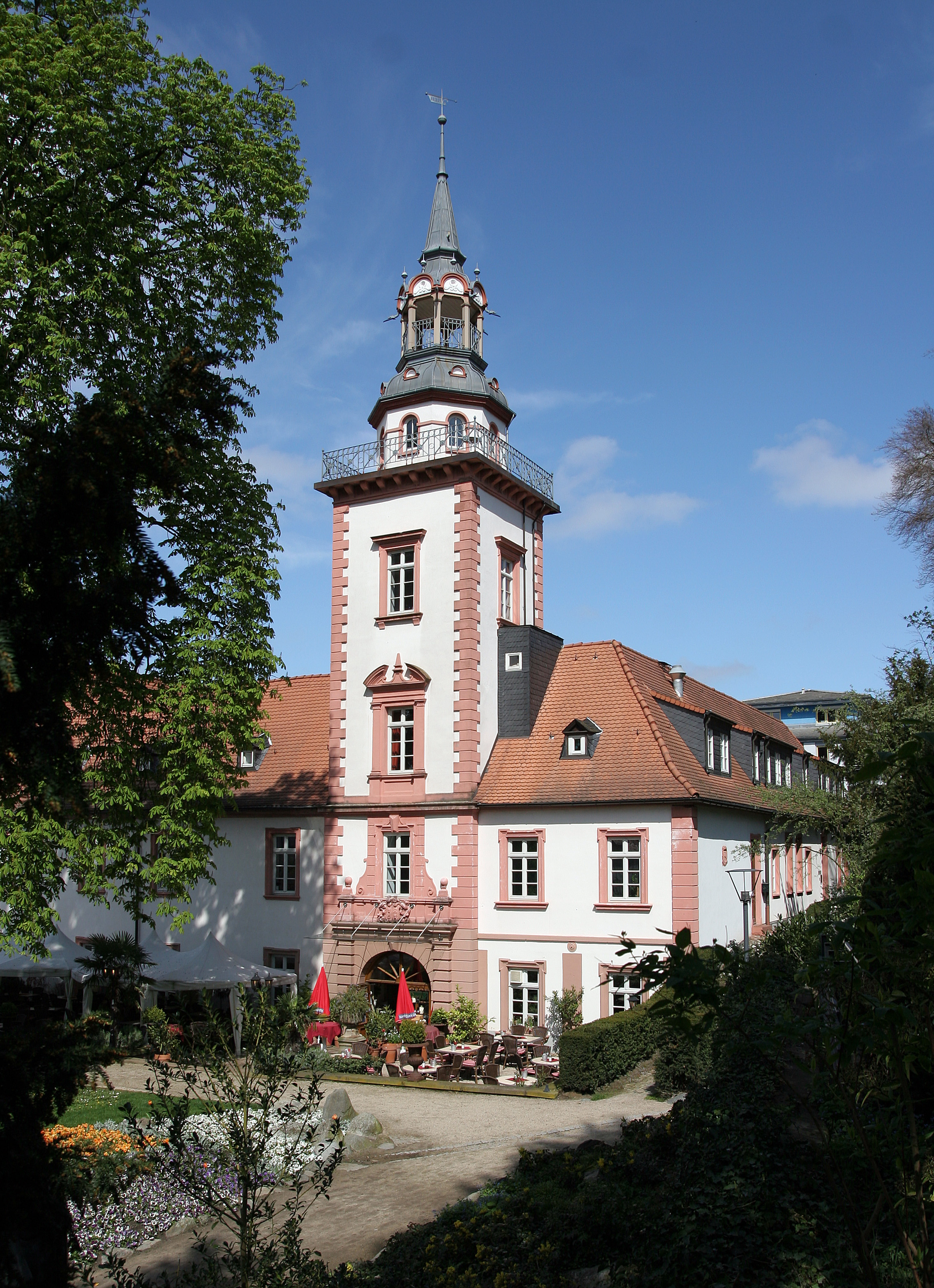 Der Rodensteiner Hof in Bensheim (Südhessen)